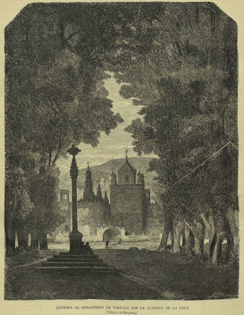 Entrada al monasterio de Veruela por la Alameda de la Cruz, grabado recogido en la revista española La Ilustración Católica.